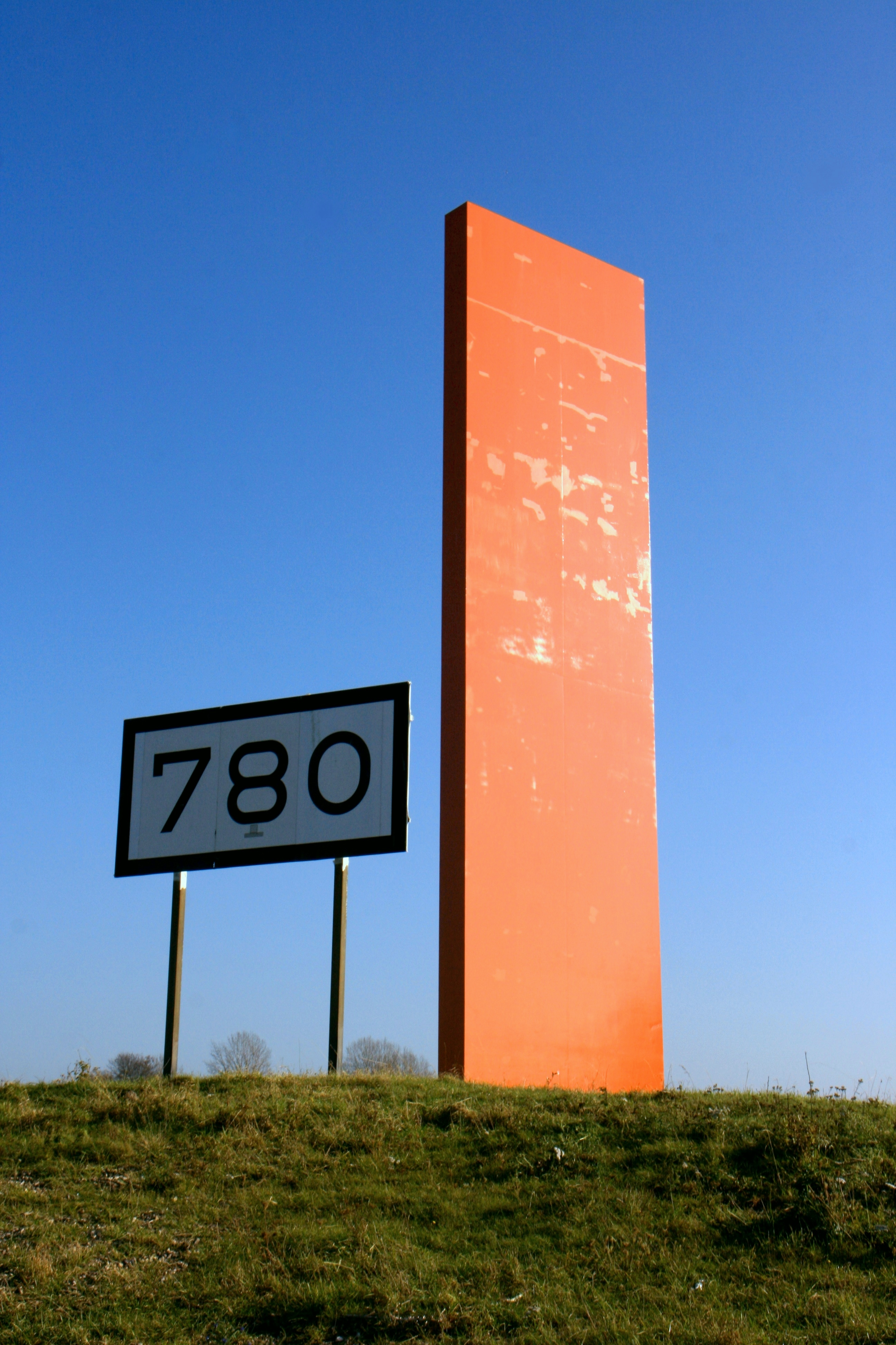 Rheinorange, Am Bört in Duisburg